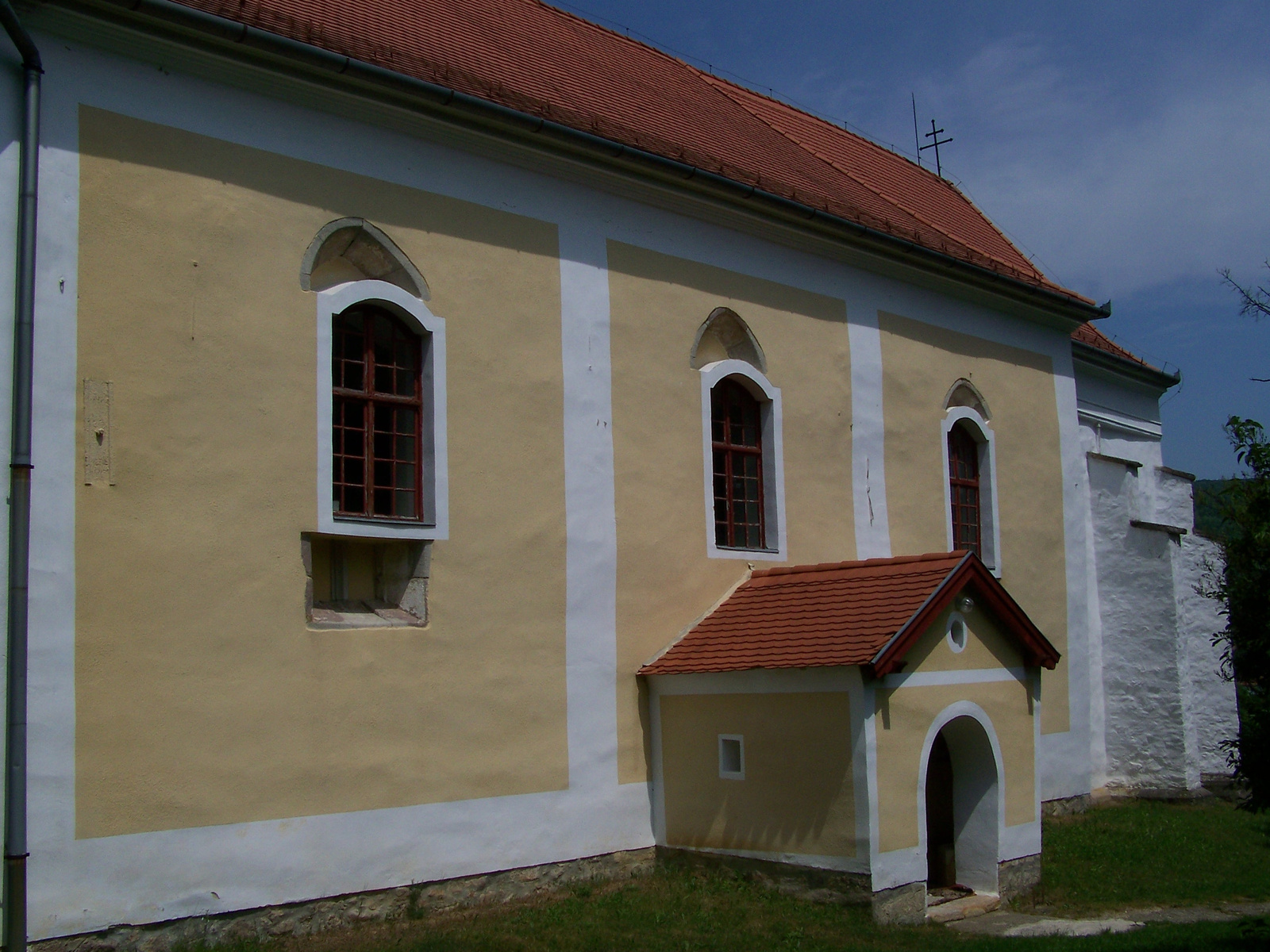 Római katolikus templom (Szent István király) (Alsópetény, Werbőczy köz 2.)